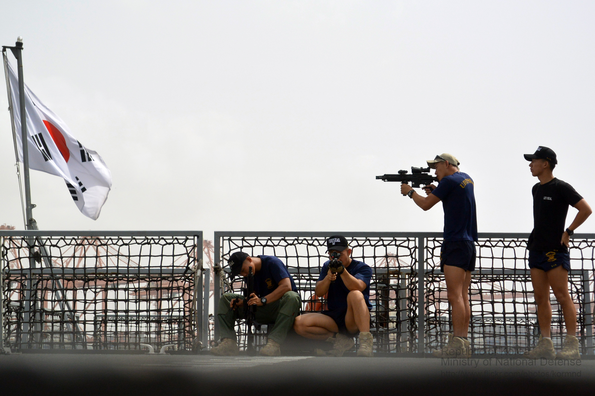 의무병 일병 이기창 作